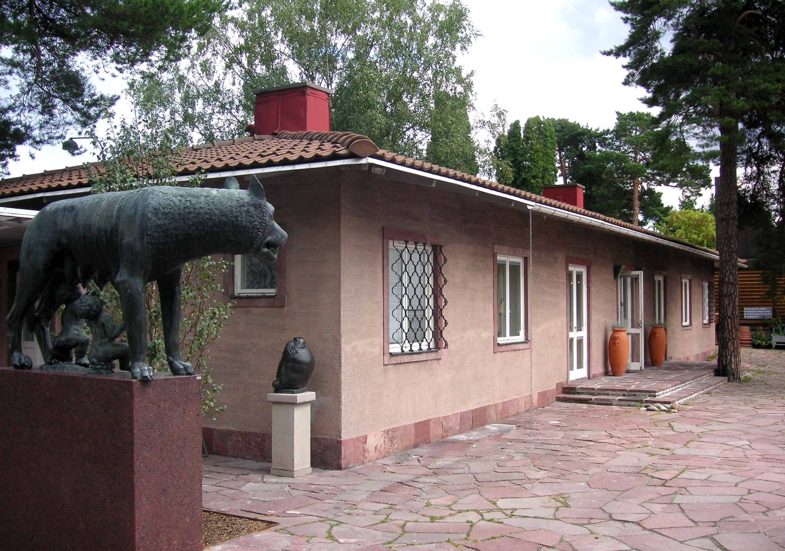 Millesgården, "Annas hus" av arkitekt Evert Milles